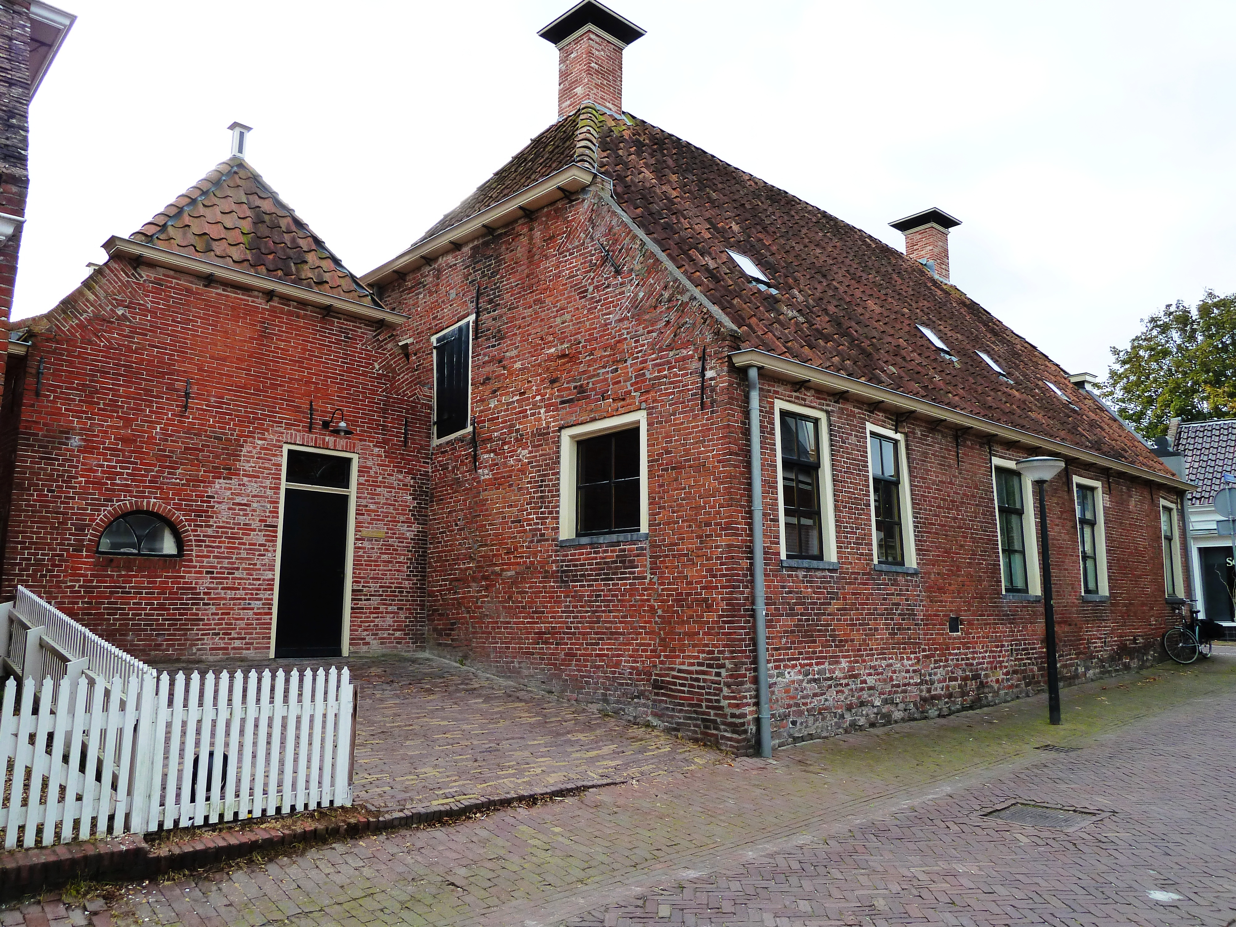 Winsum: Jacobijnenhuis/voormalige bakkerij, achterzijde (Havenstraat 2). Zie ook voorzijde (Hoofdstraat Winsum 27).